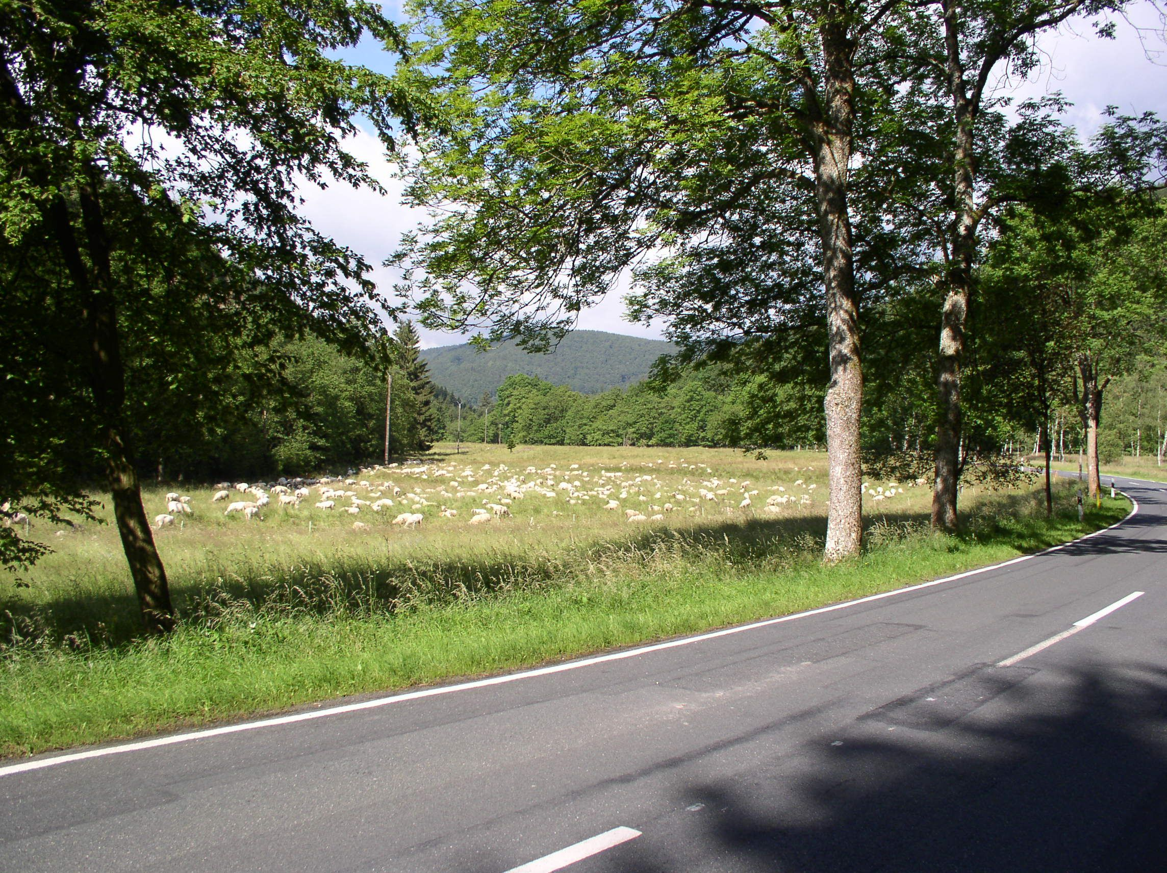 Schafherde im Siebertal